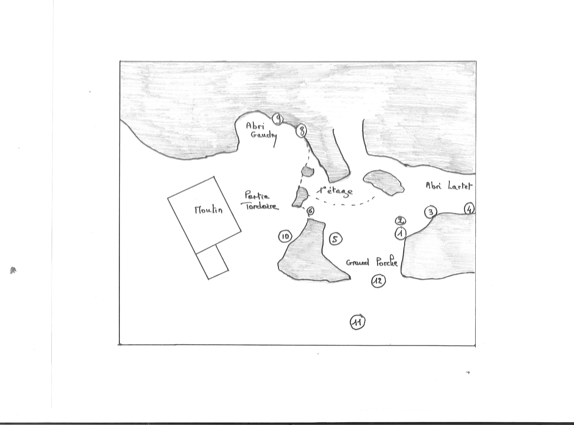 Plan schématique de la grotte de Montgaudier, à Montbron, Charente, France.